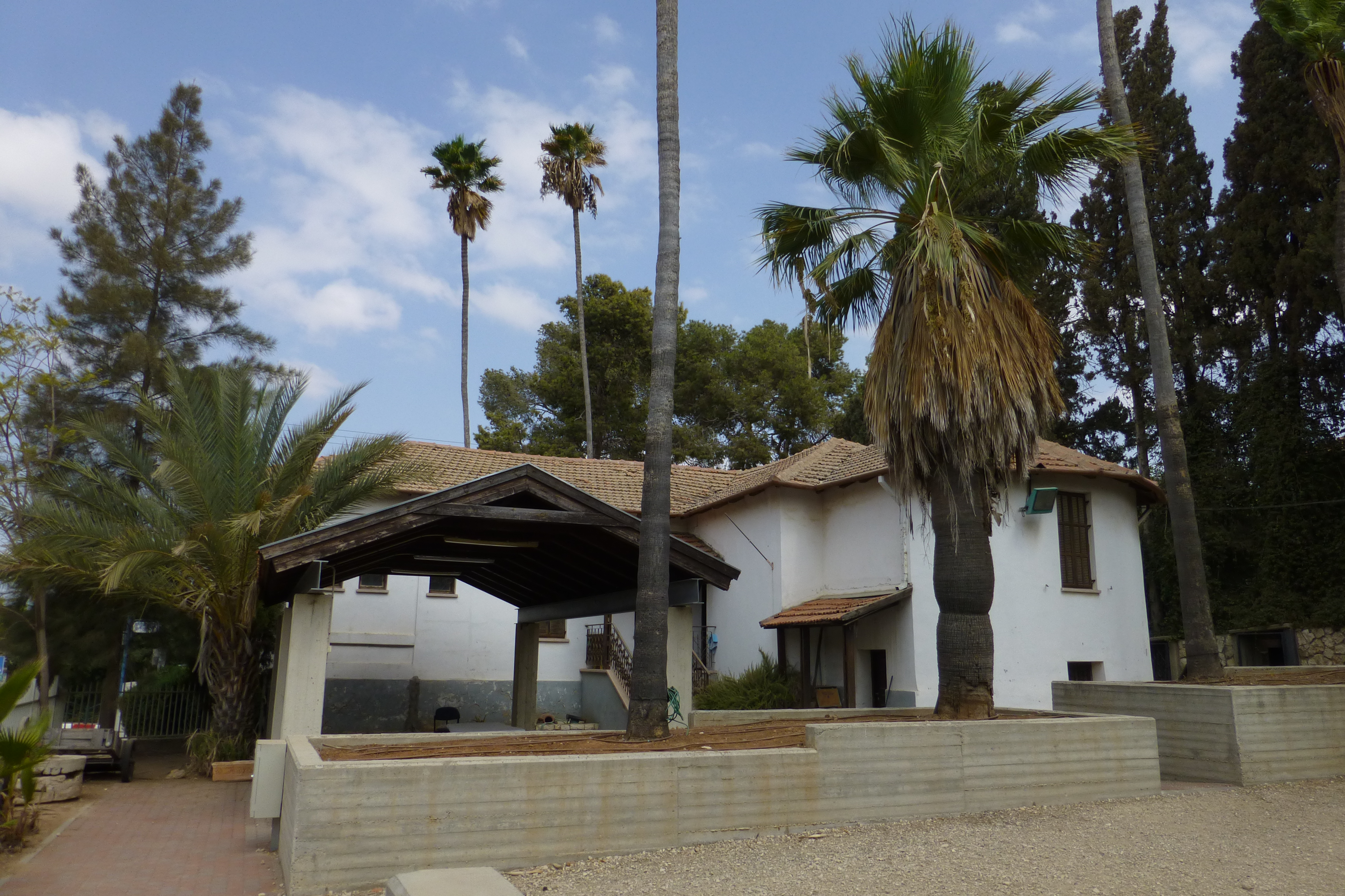 נבנה ב1924, על ידי משה ורחל מינץ. שימש בחלקו המערבי כבית מגורים ובחלקו המזרחי כבית עם. כיום הוא משכנו של מוזיאון לתולדות גדרה והביל"ויים.